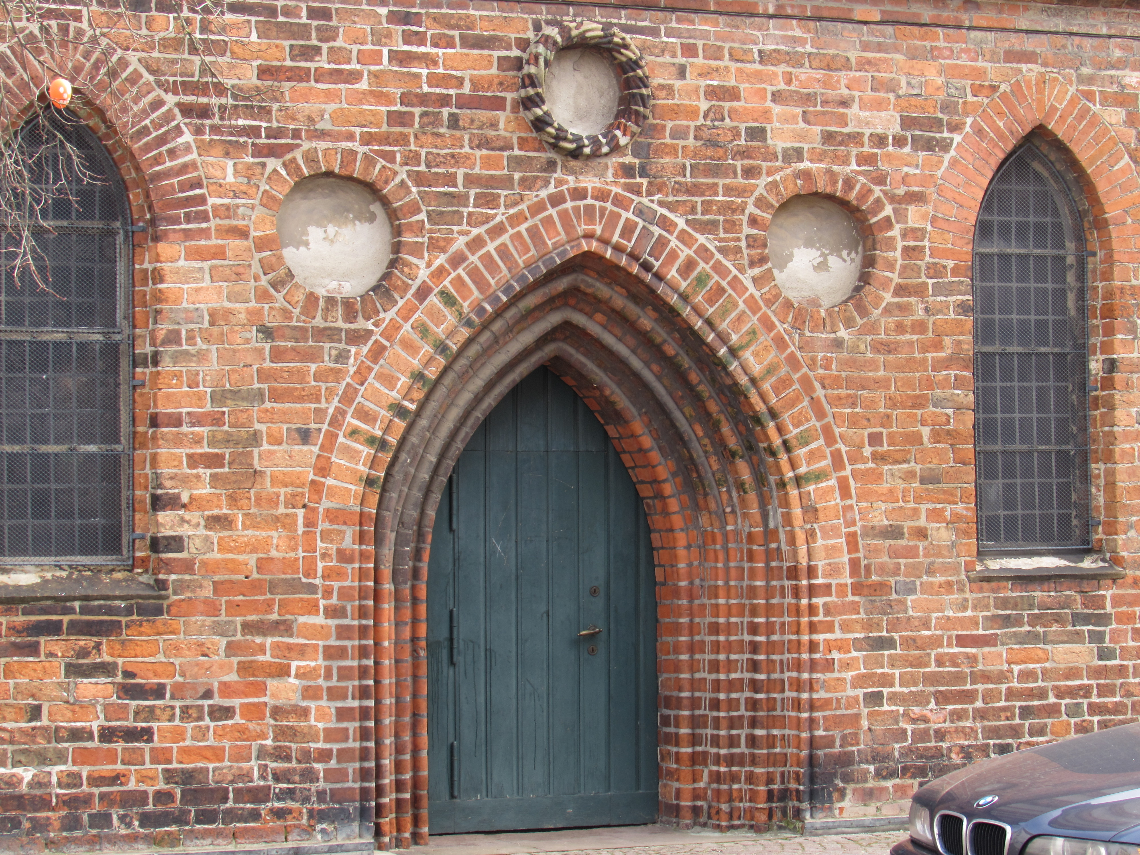 Eingangstür der Heiligen-Geist-Kapelle (Uelzen)